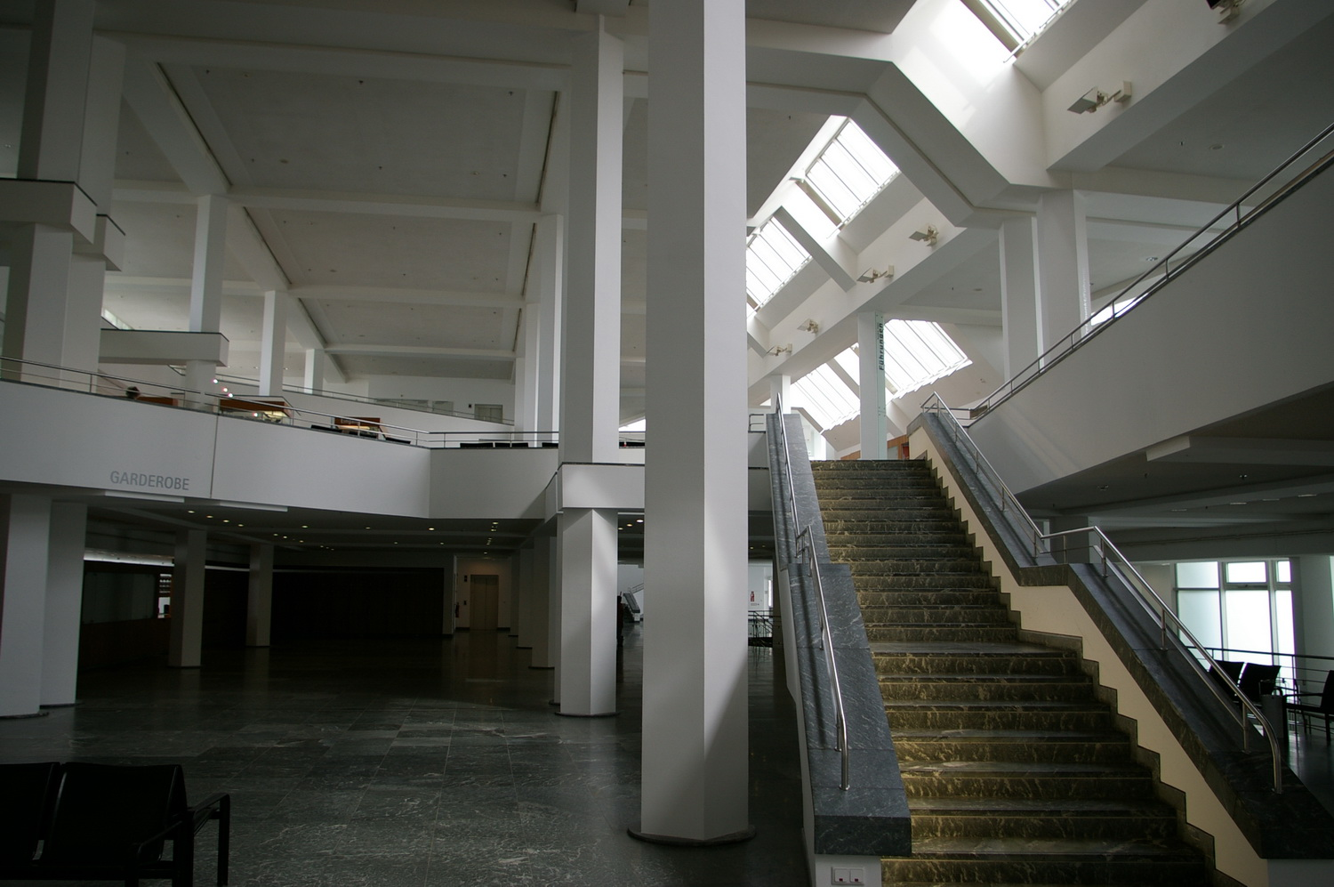 Gemaeldegalerie : entrée